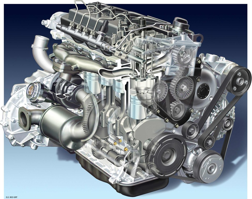 Avantime Silnik 2.2 DCI G9T